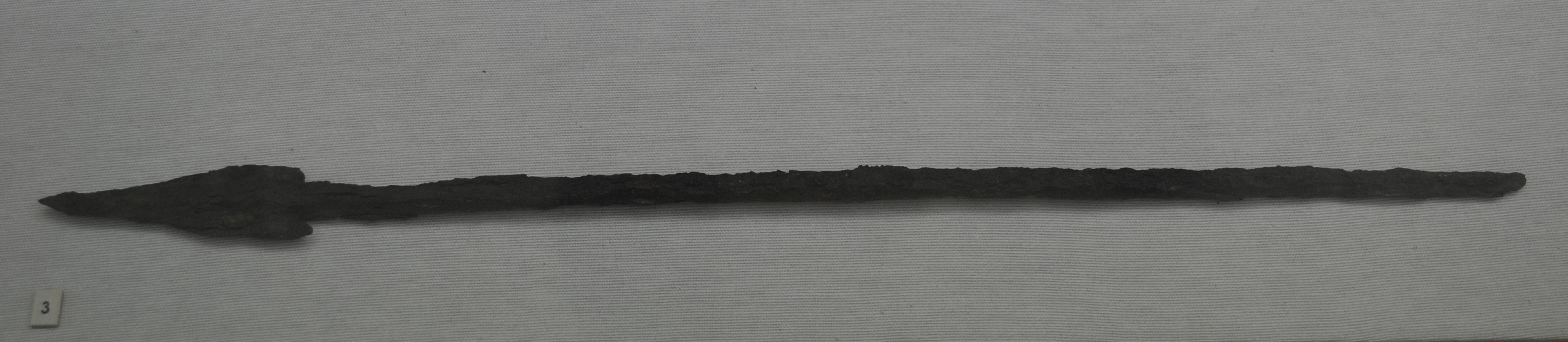 Soliférreo ibérico de la Bastida de les Alcusses. Museo de Prehistoria de Valencia.